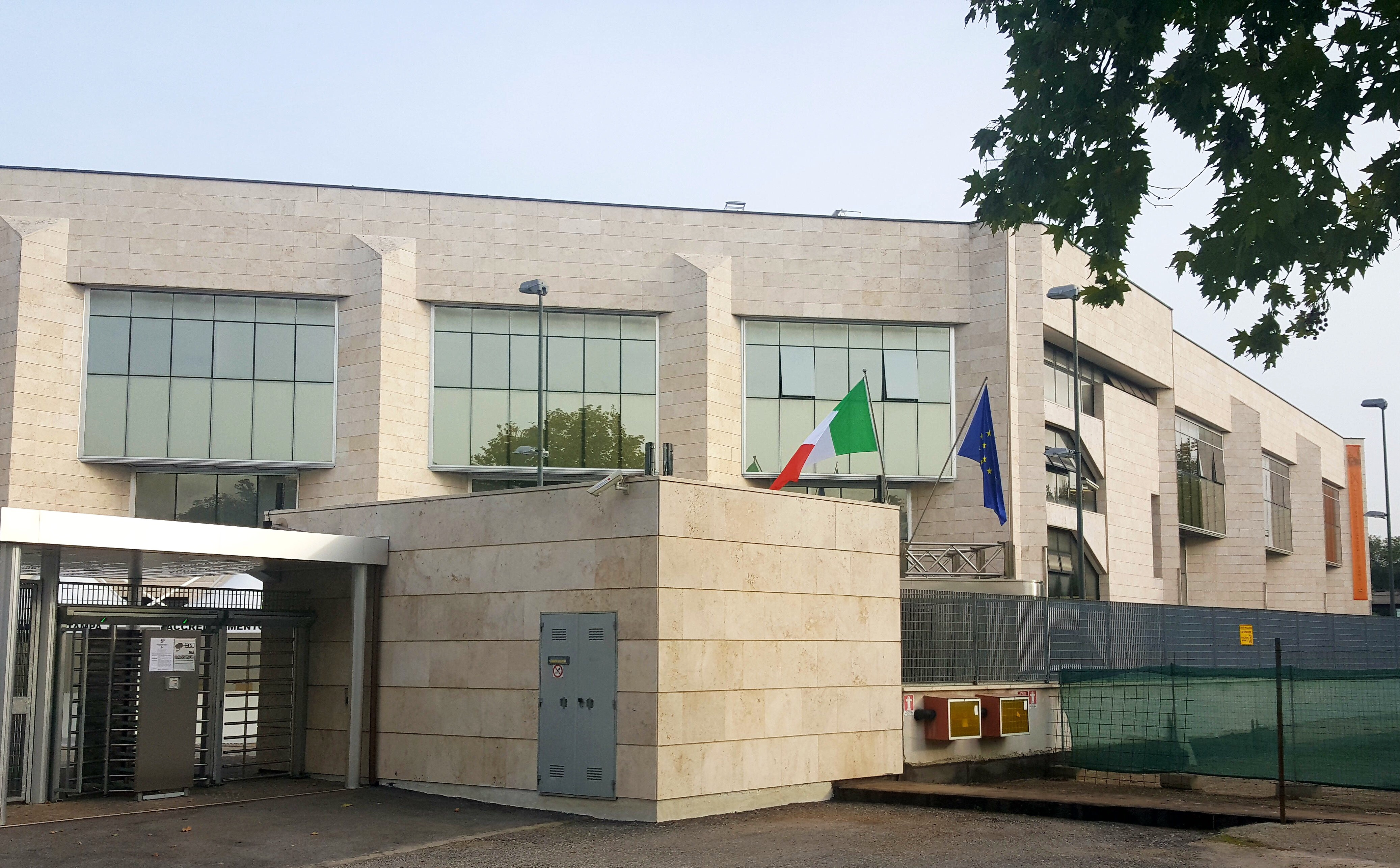 Museo della zecca, presso l'IPZS a Roma